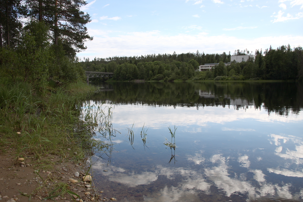 Trysilelva in Nybergsund